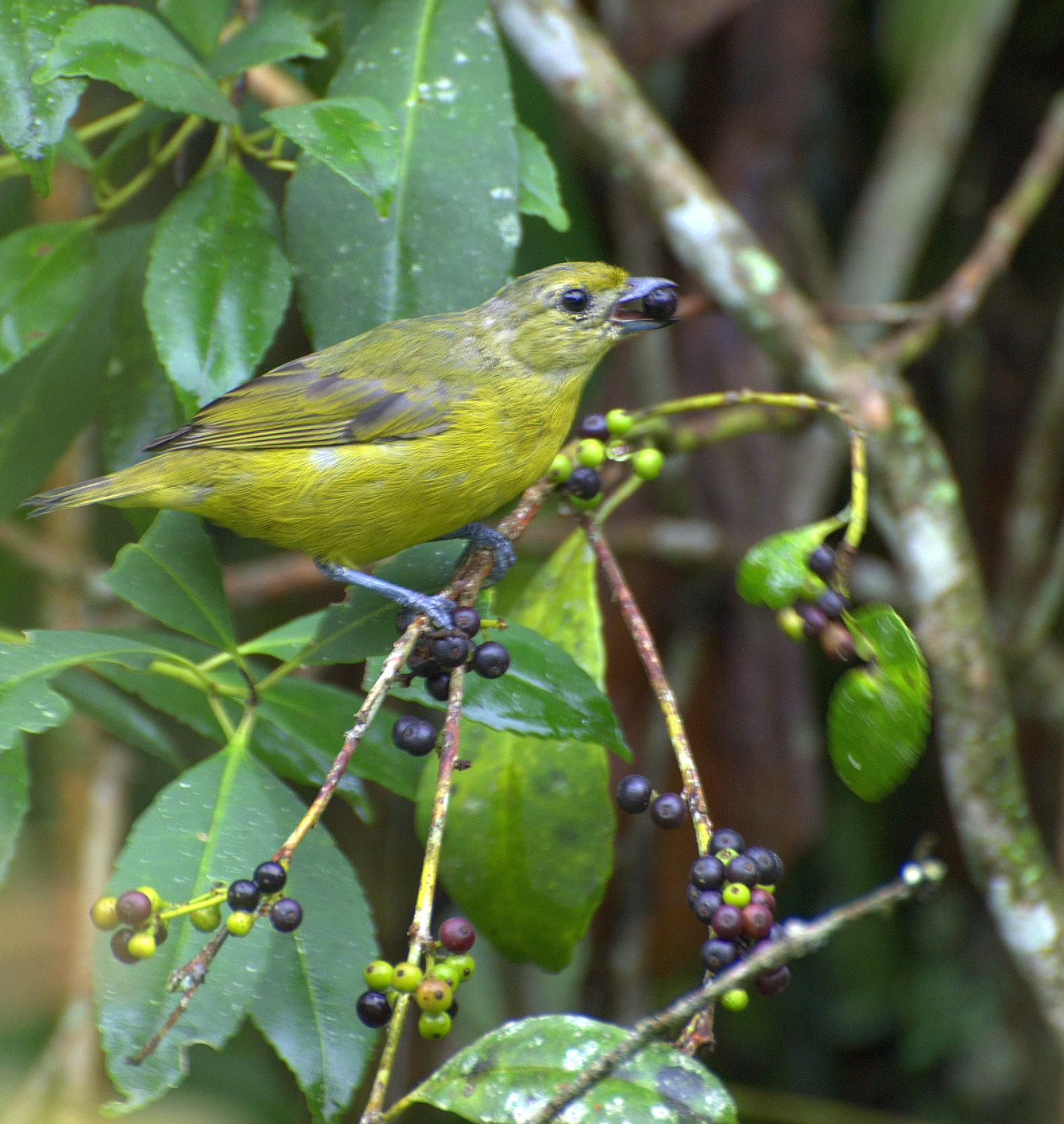 Vale do Ribeira - Registro-SP